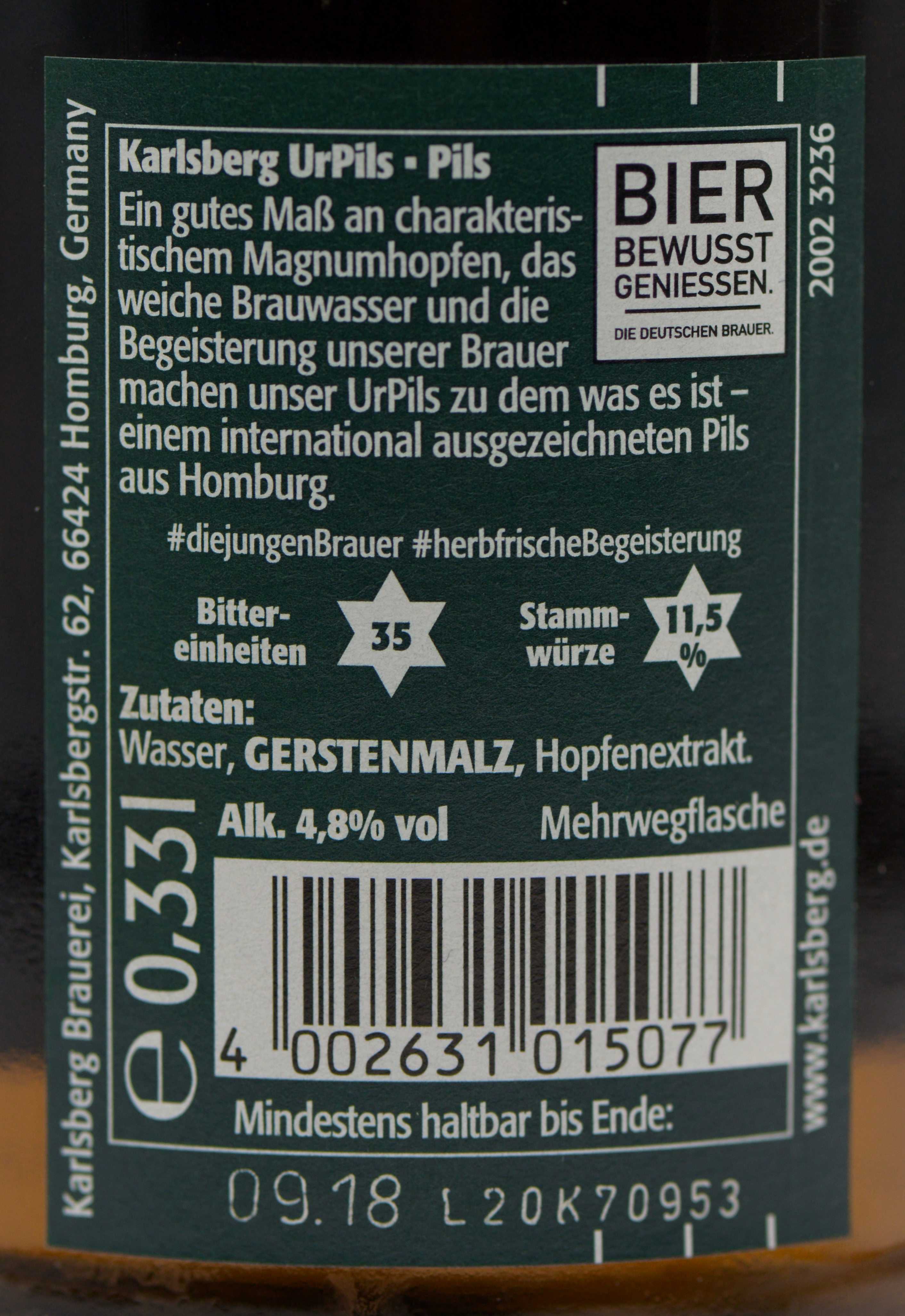 Neues Rückenetikett (ab März 2018) erstmals mit Angaben über die Bittereinheiten der Sorte Urpils der Karlsberg Brauerei in Homburg, Saarland/ Deutschland (2018).